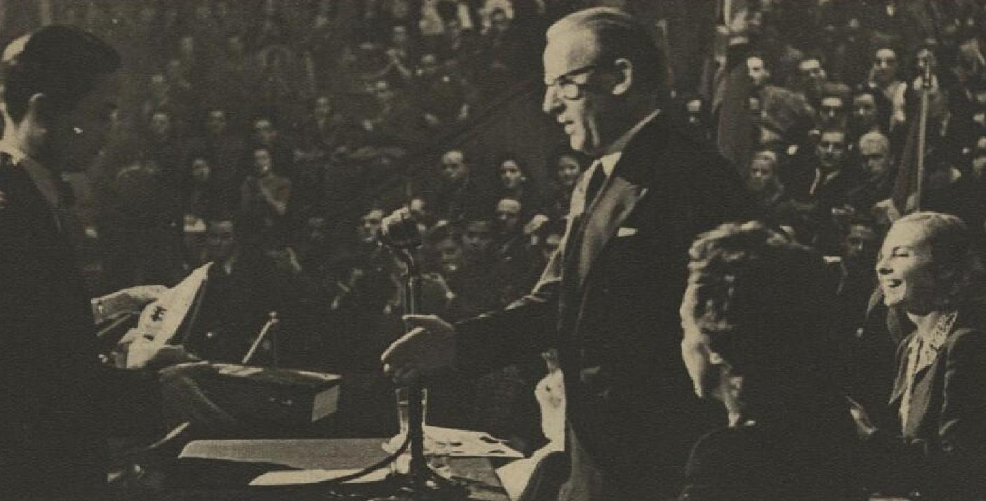 Václav Paleček (1901-1970), český diplomat a politik